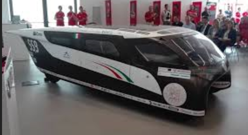 Emilia 4 Solar Car